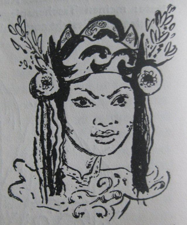 Robert Genin: Portrait der Legontänzerin Diablet. Illustration, 1926